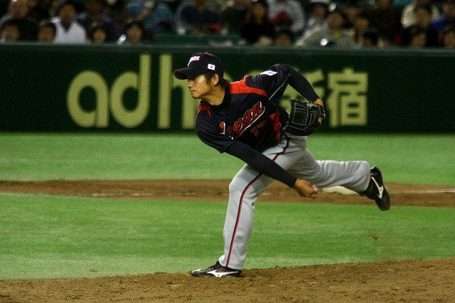 2009年11月NPB U-26戦 唐川侑己投手(千葉ロッテマリーンズ所属)